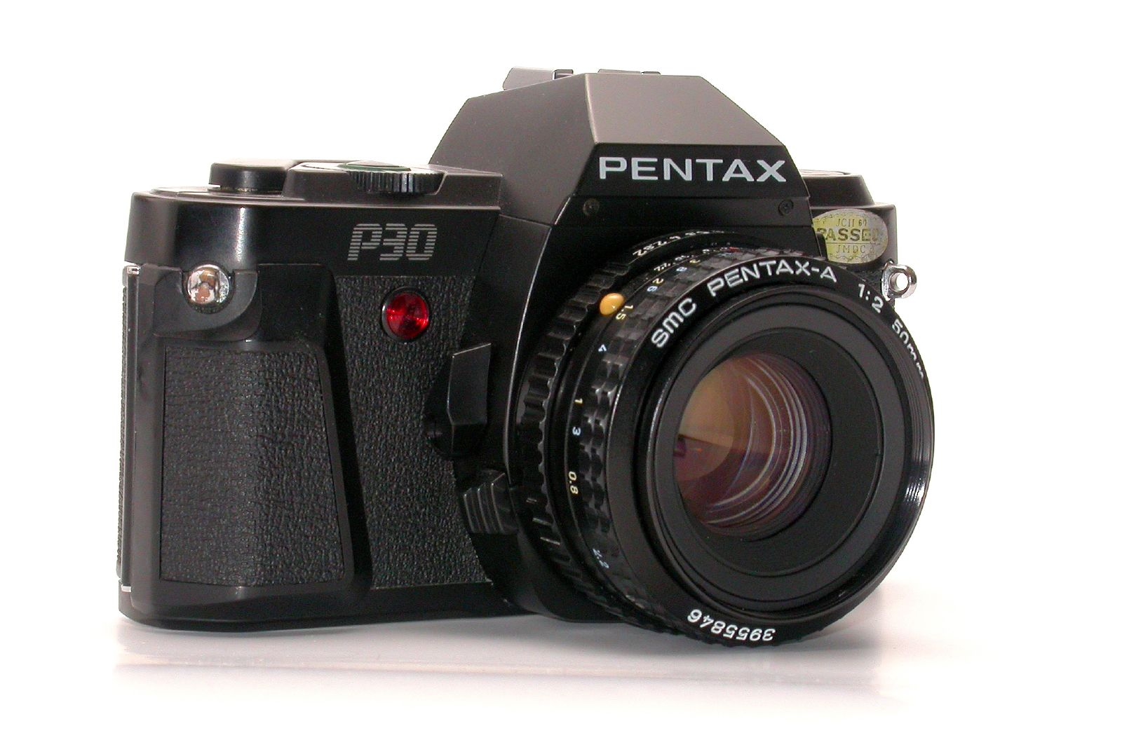 Pentax P30